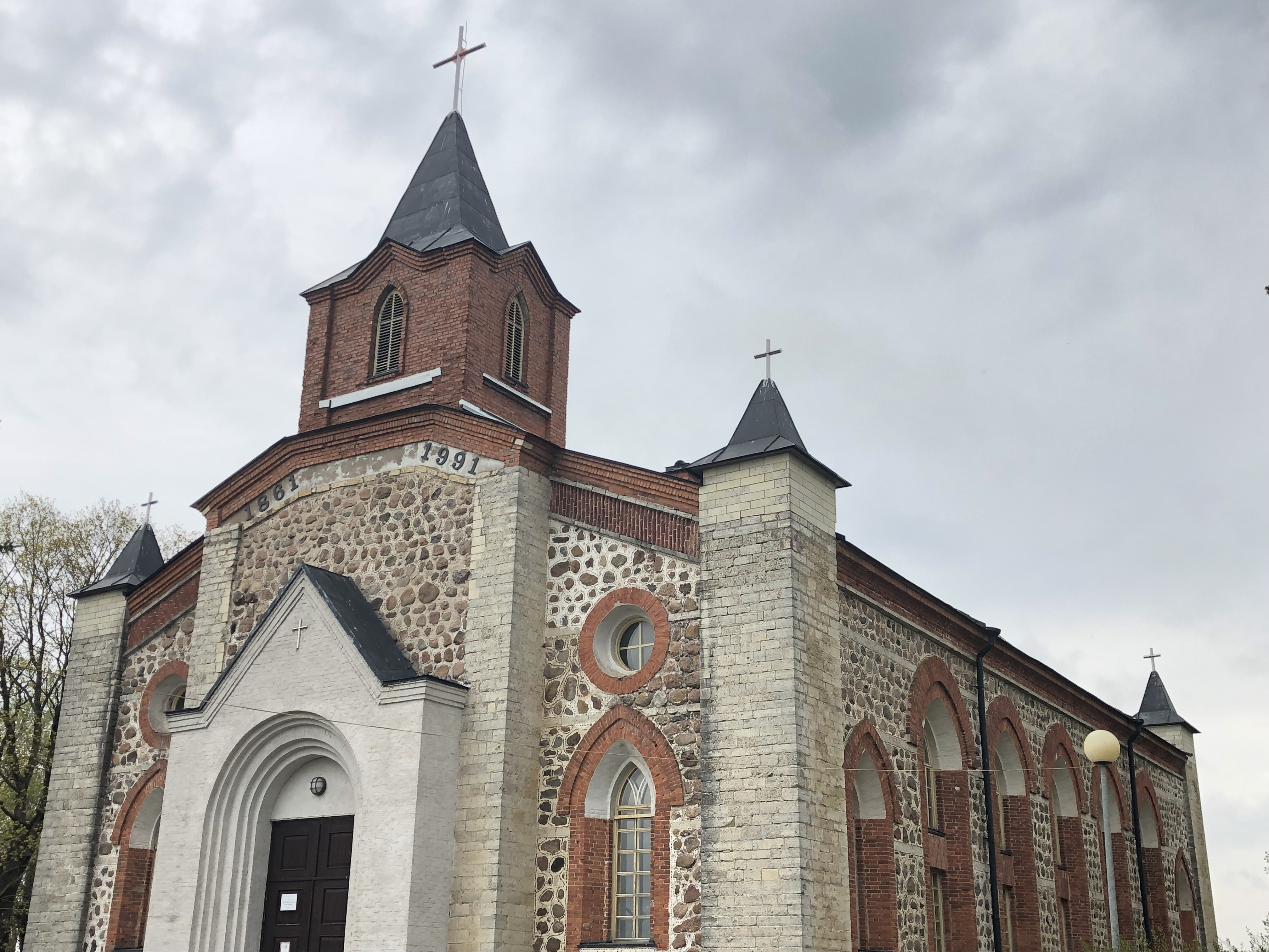 Кирха святого Иоанна в Губаницах_2019